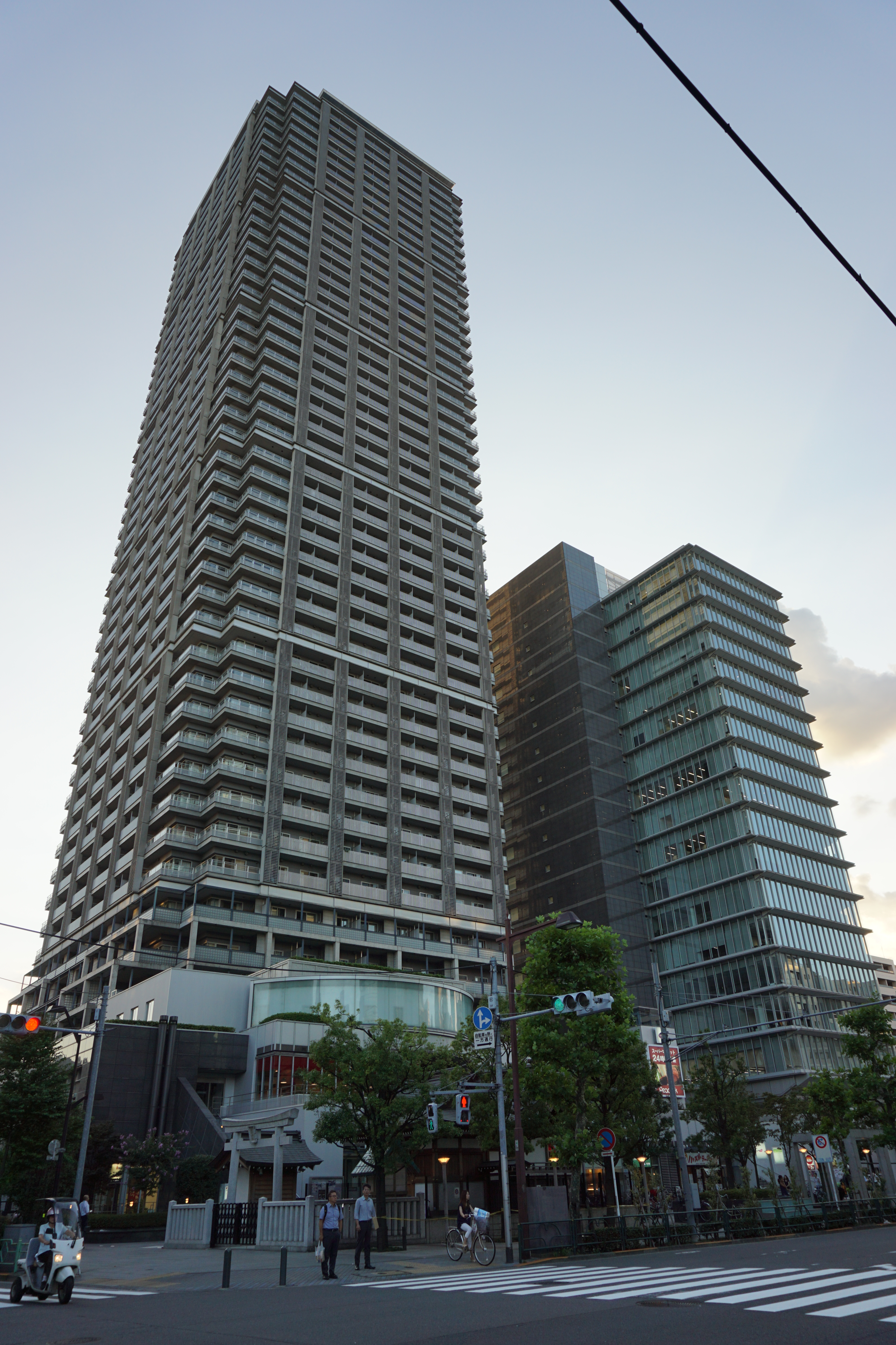 左がトルナーレタワーで右がオフィス棟です。